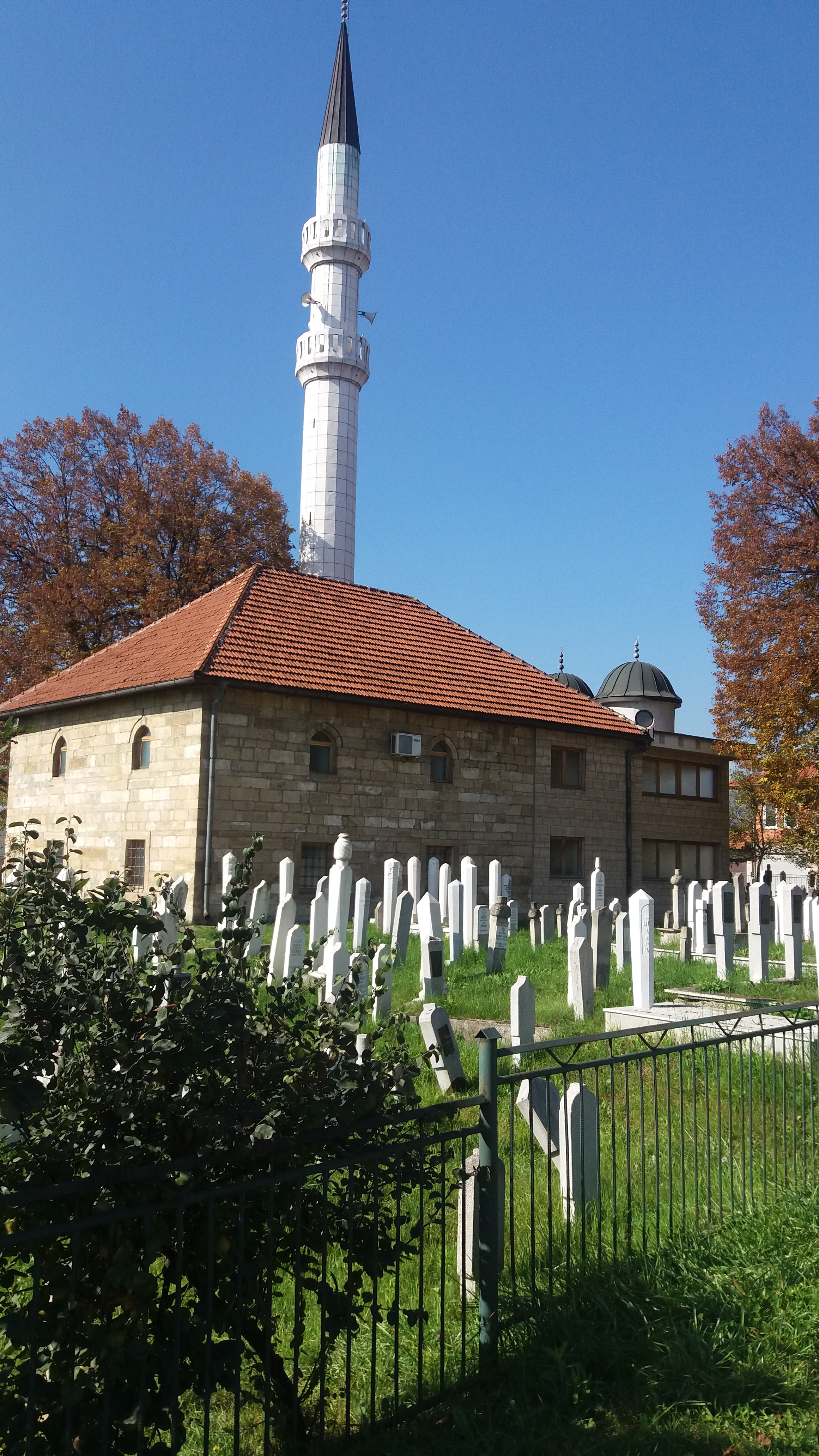 Ahmed-agina džamija u Vitezu 2016.